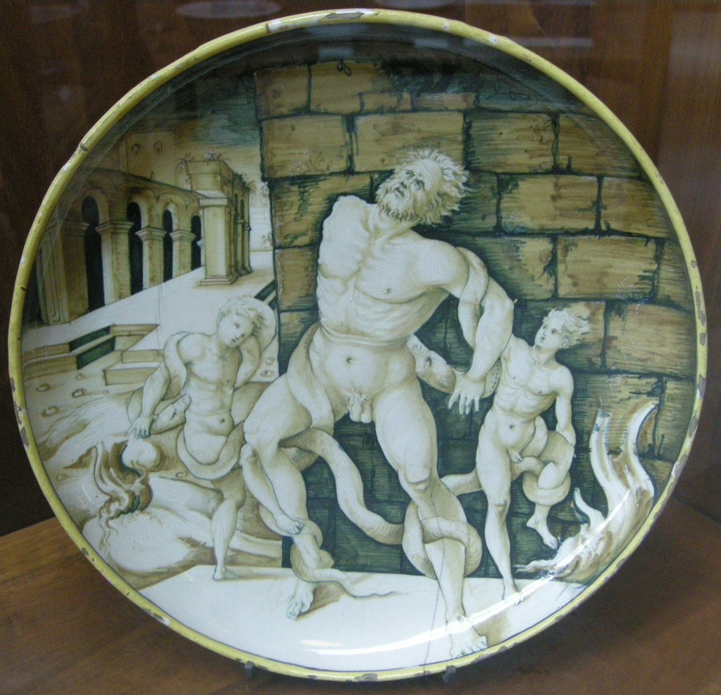 C.sf., urbino, coppa con laocoonte, 1530-1545 circa